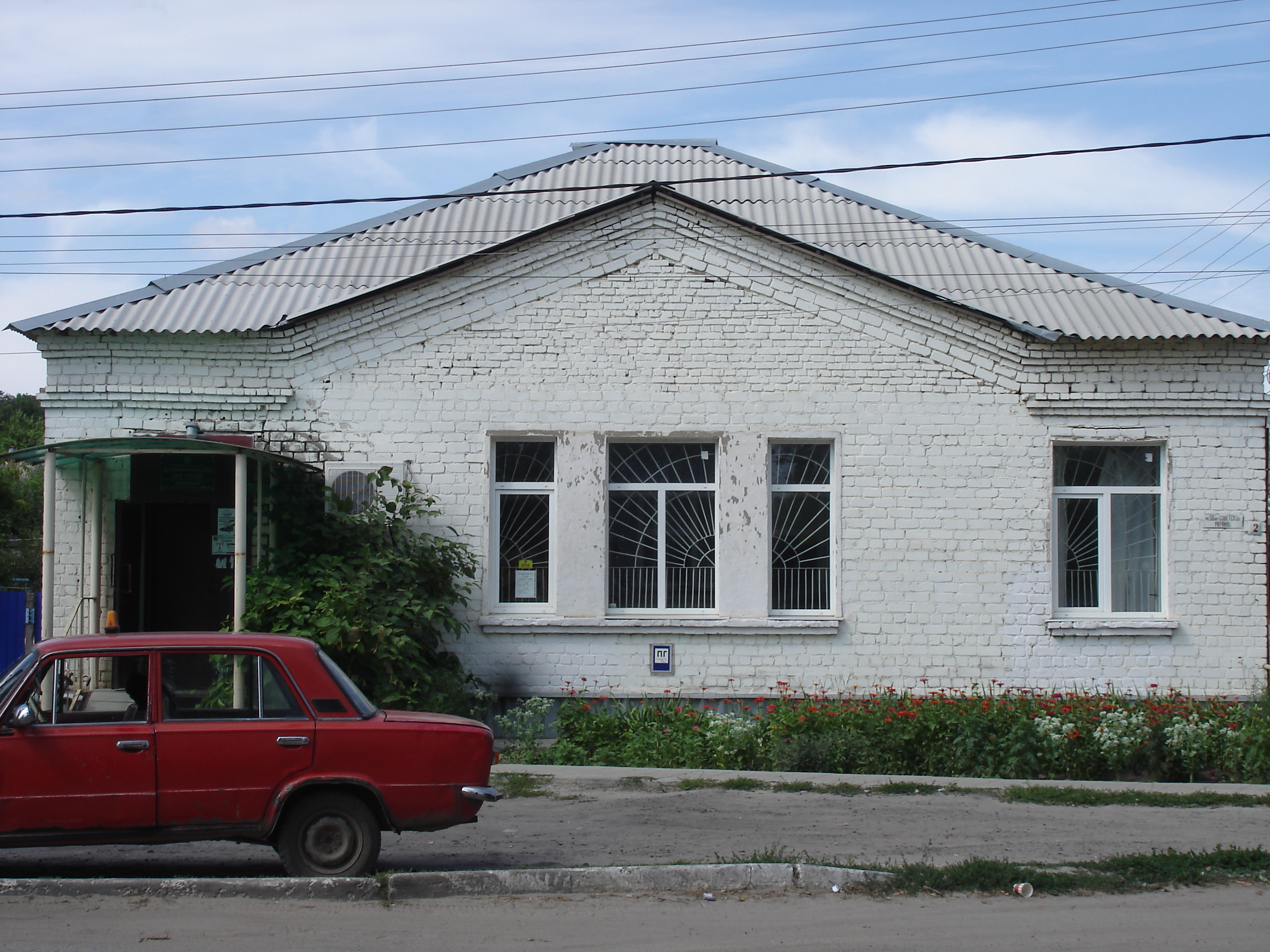 Житловий будинок (сучасне використання — ощадкаса), Барвінкове, вулиця Освіти (50 років Радянської України), 2